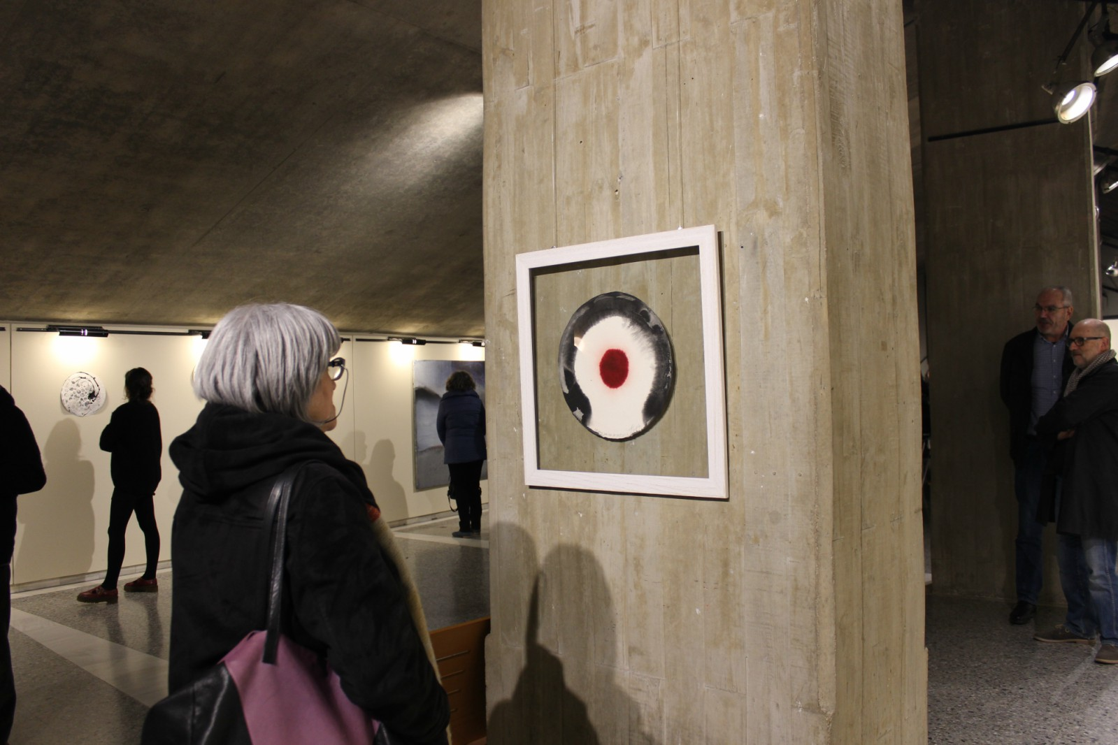 La Passió d'Olesa. Una dona mira el cartell de la temporada 2017, obra de la pintora Francesca Llopis, exposat a l'Espai d'Art del teatre.